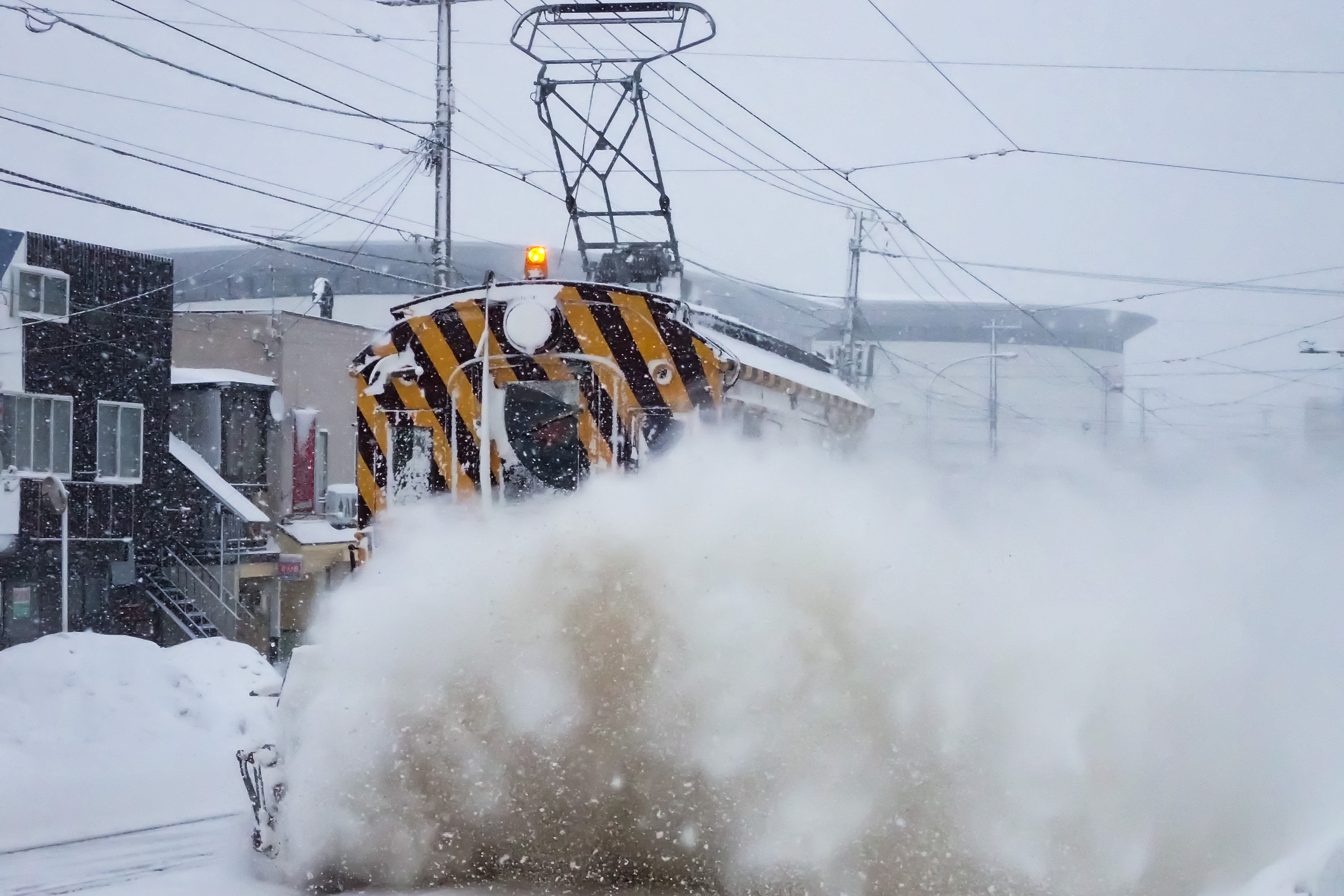 函館市電の除雪車「ササラ電車」である、元東京市電ヨへロ1形の排3号。2018年2月12日撮影。